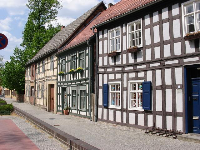 Treuenbrietzen, Brandenburg, historische Häuser